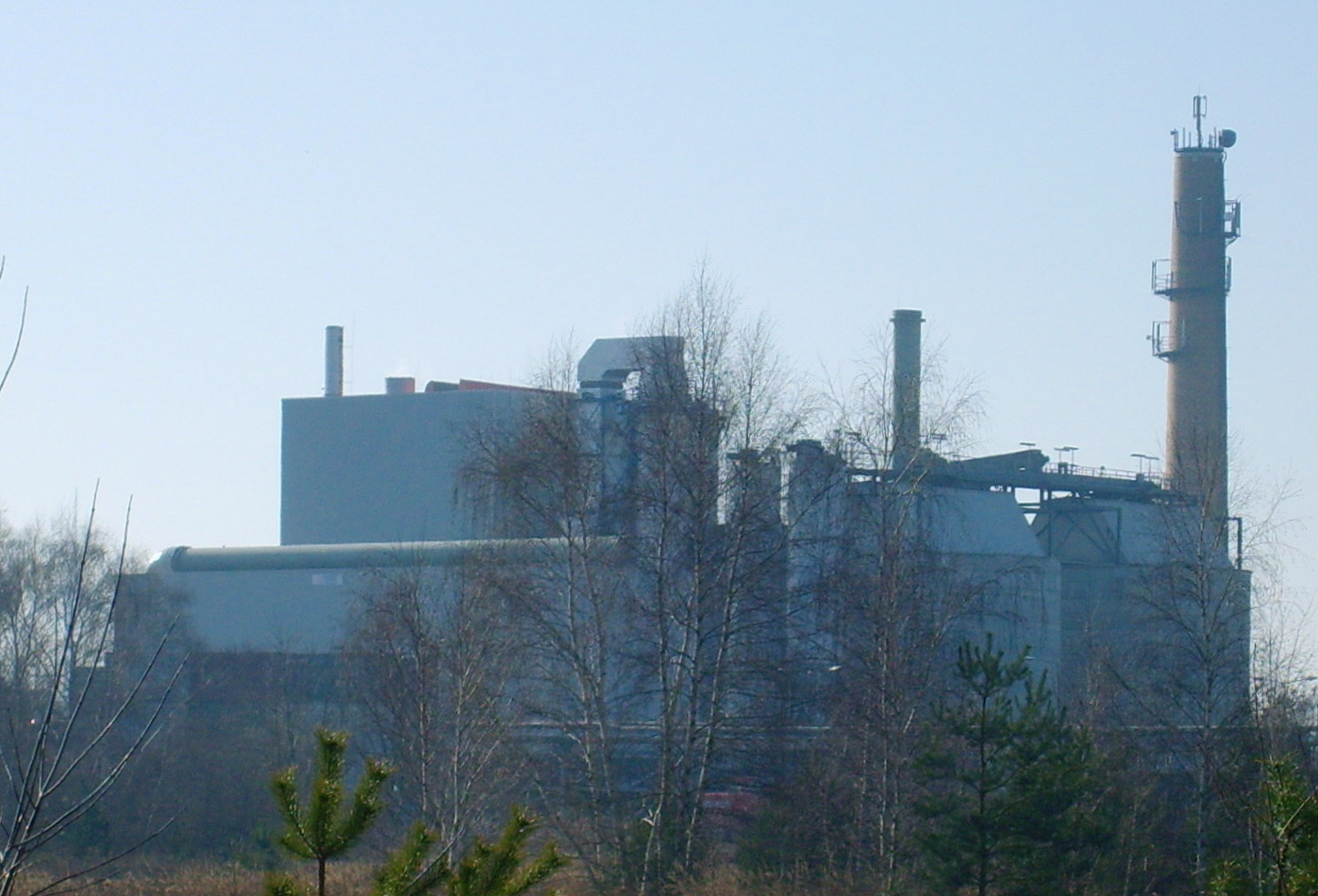 Das Biomassekraftwerk in Elsterwerda